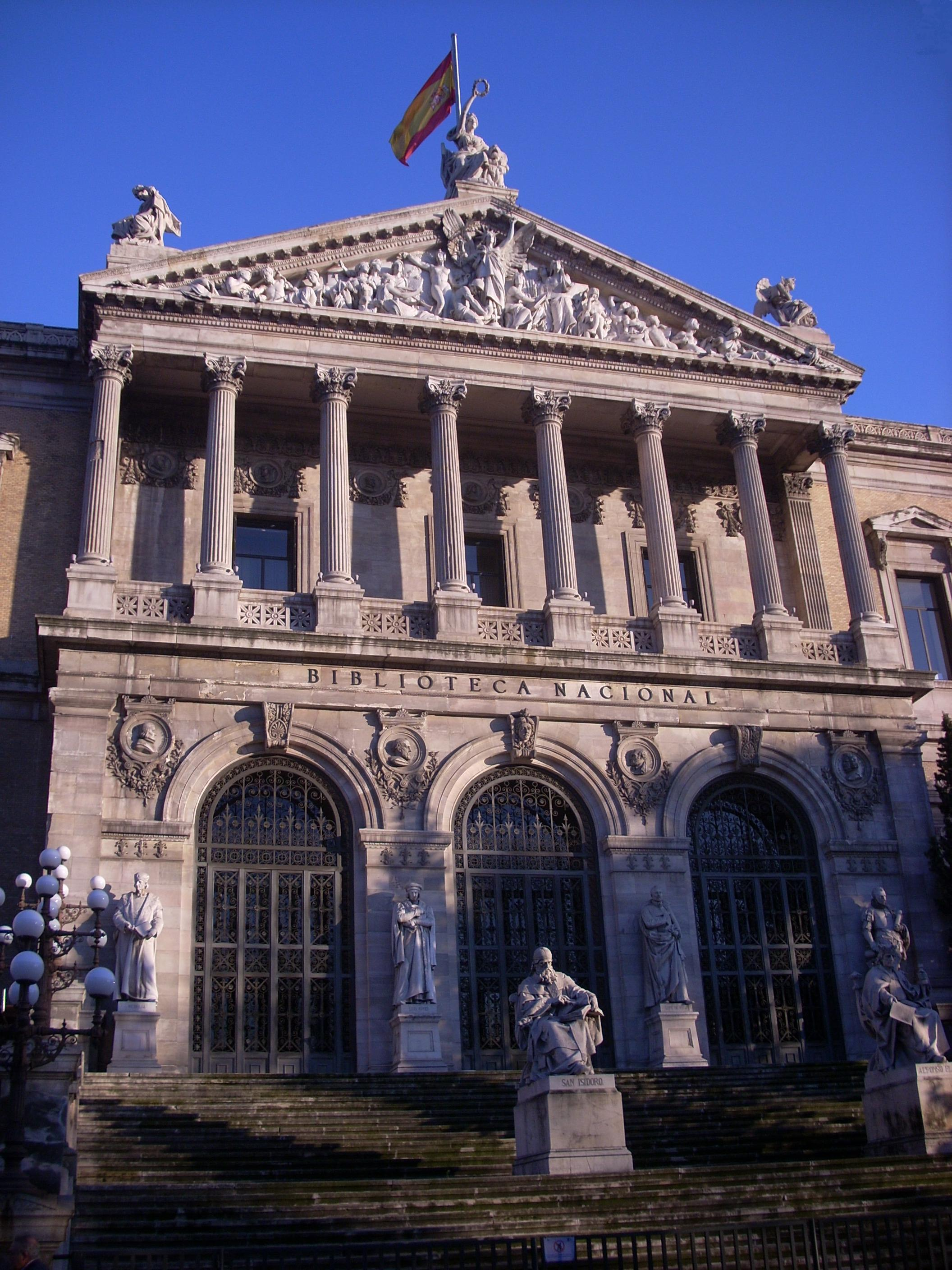 Fachada de la Biblioteca Nacional de España, en Madrid.